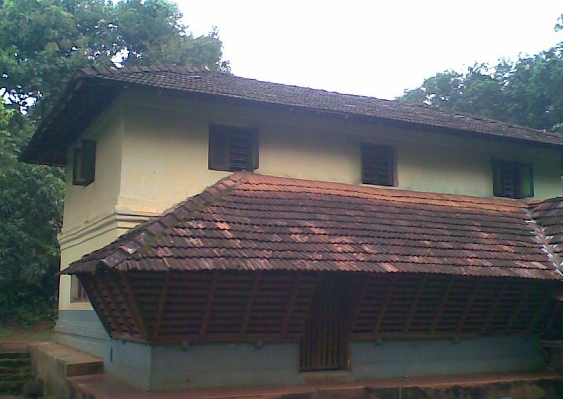 Kavannayil Tharavaadu(ancestral home)Thelakkad Perinthalmanna,Malappuram Distict of Kerala, India.